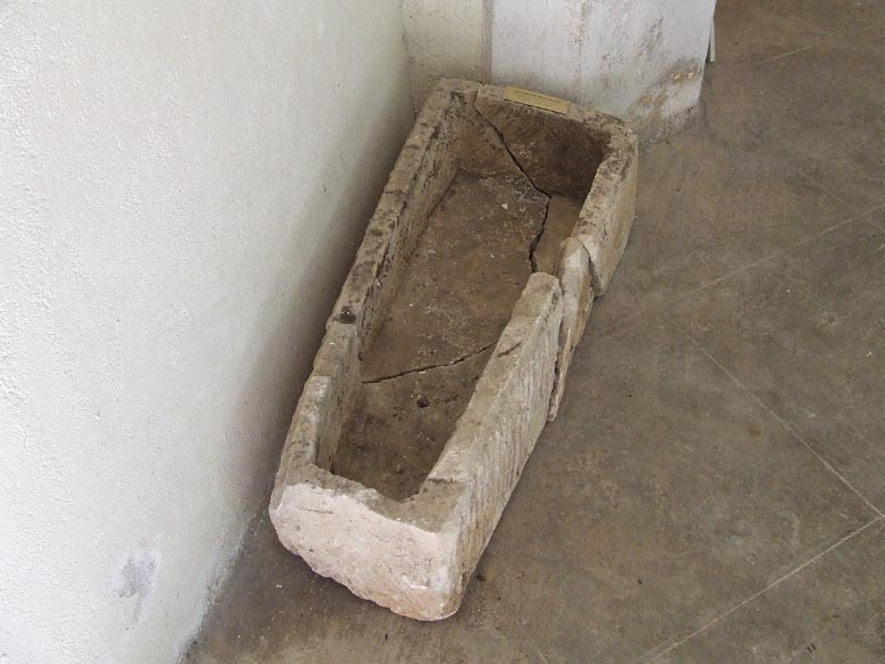 Sarcophage de l'ancien cimetière mérovingien de Chevigny (commune d'Étais-la-Sauvin)